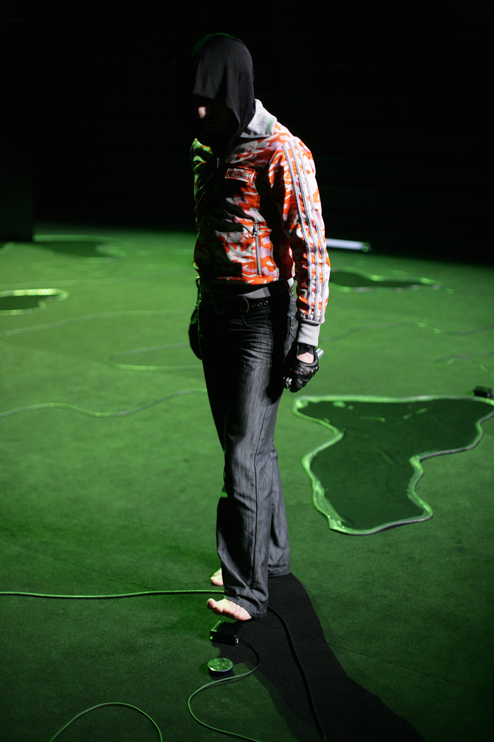 Rachid Ouramdane dans le spectacle Loin... en 2008.